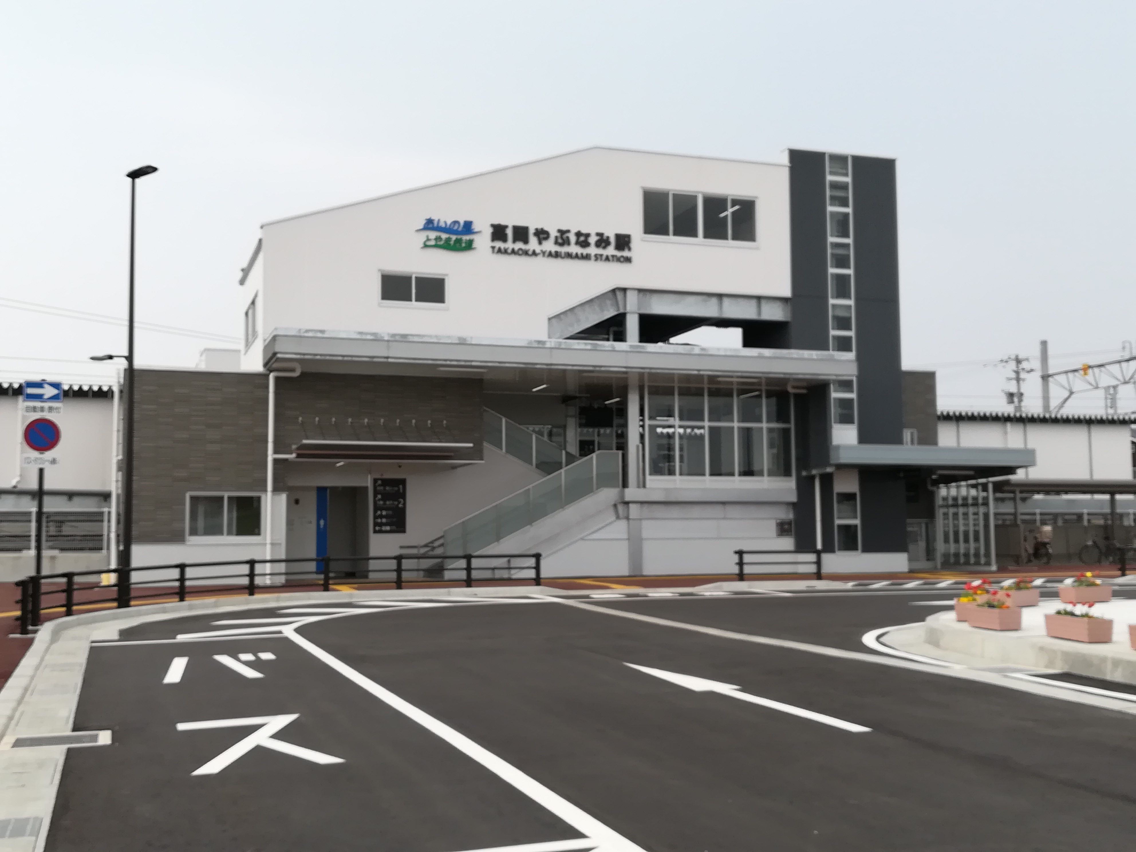 あいの風とやま鉄道線・高岡やぶなみ駅、東口駅舎